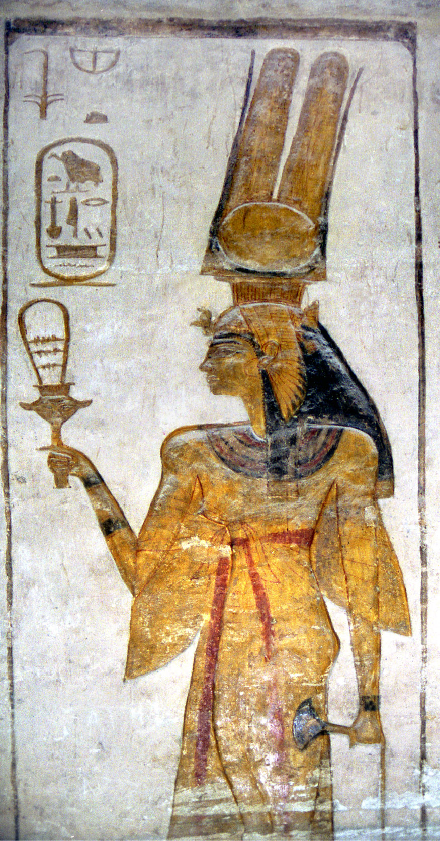 Abu Simbel, Kleiner Tempel, geweiht Nefartari der Gemahlin Ramses II. und Göttin Harthor, Nefartari mit Sistrum